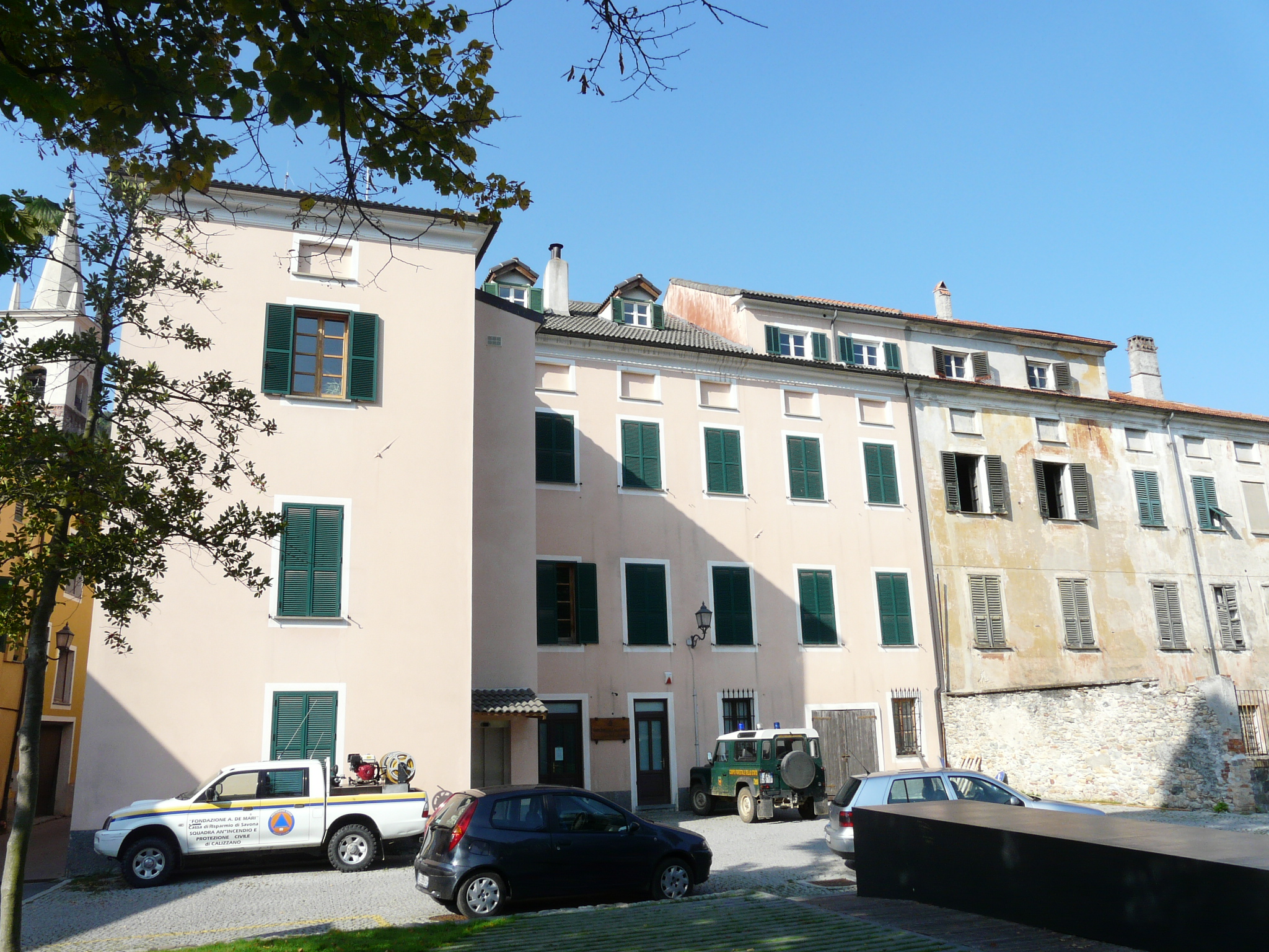 Palazzo Franchelli di Calizzano, Liguria, Italia